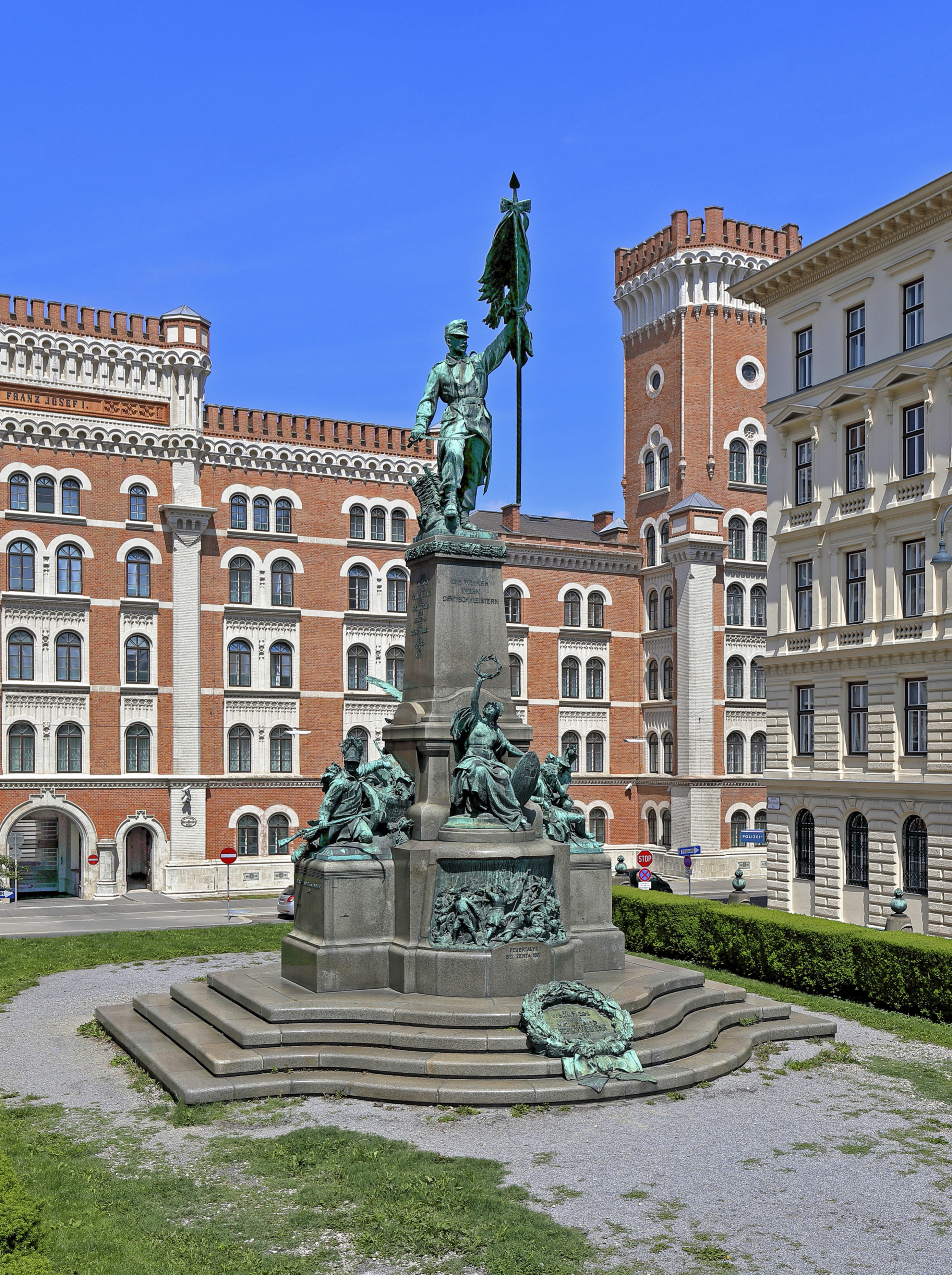 Das Deutschmeister-Denkmal im Zentrum des Deutschmeisterplatzes im 1. Wiener Gemeindebezirk Innere Stadt und dahinter die Rossauer Kaserne. Das Denkmal wurde anlässlich des 200-Jahre-Bestandsjubiläums des k.u.k. Infanterieregiment „Hoch- und Deutschmeister“ Nr. 4 1896 gestiftet und am 29. September 1906 feierliche enthüllt. Der architektonische Entwurf stammt von dem Architekten August Weber und die Bronzeplastiken von dem Bildhauer Johannes Benk.